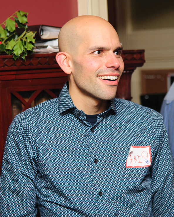 Ari Daniel Shapiro